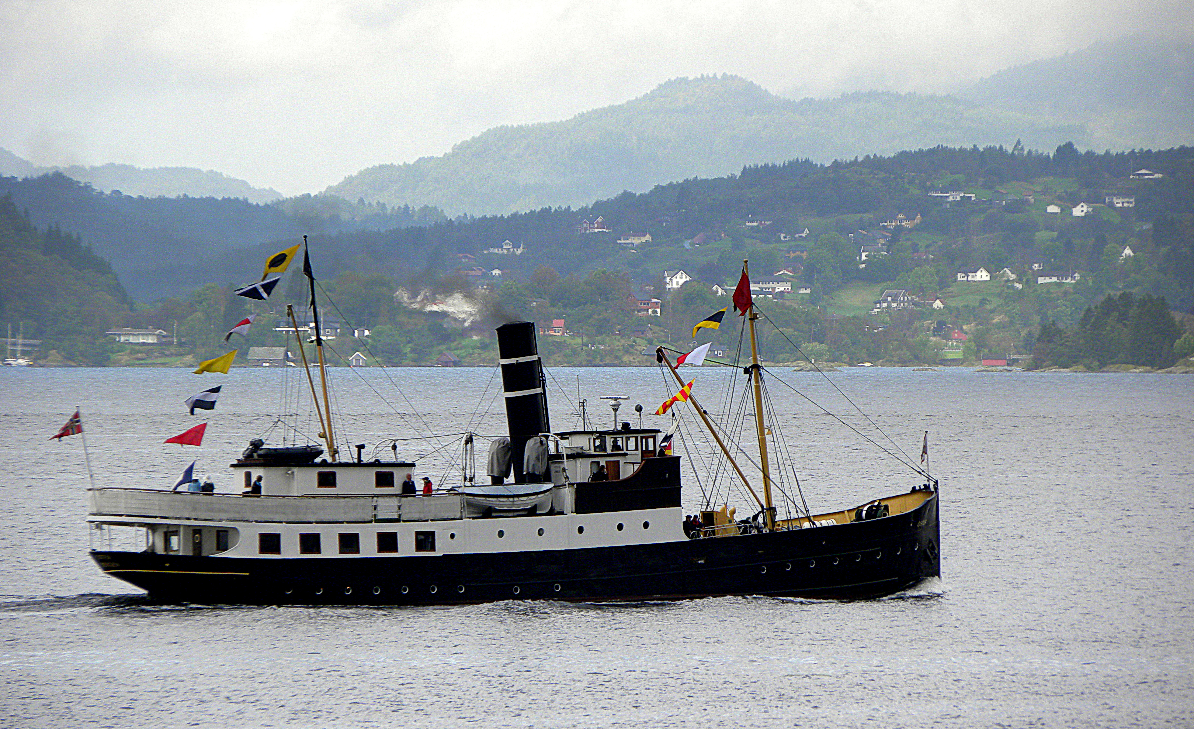 DS "Oster" passerer Eikanger på vei til Mo